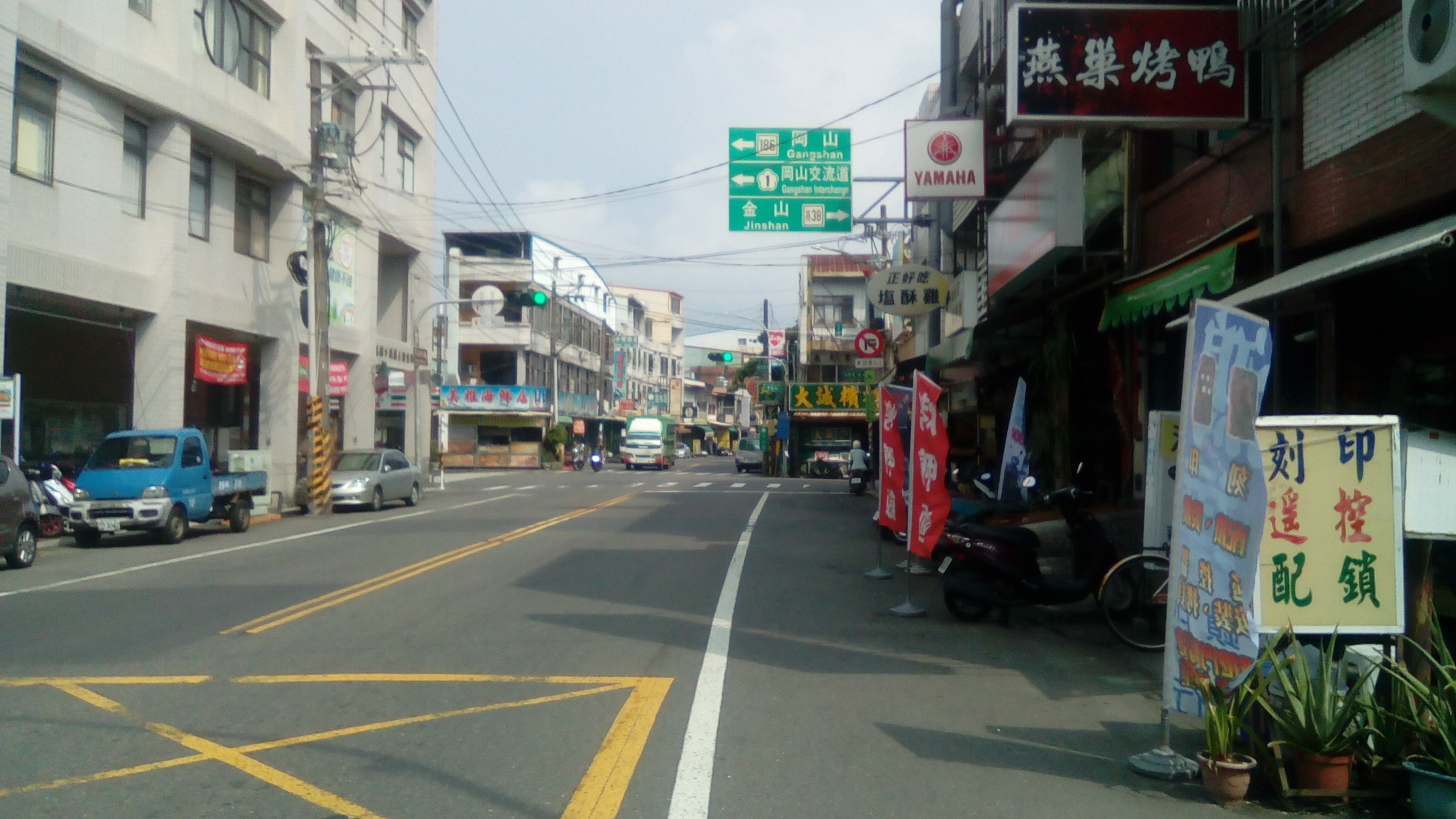 中民路及中興路一帶